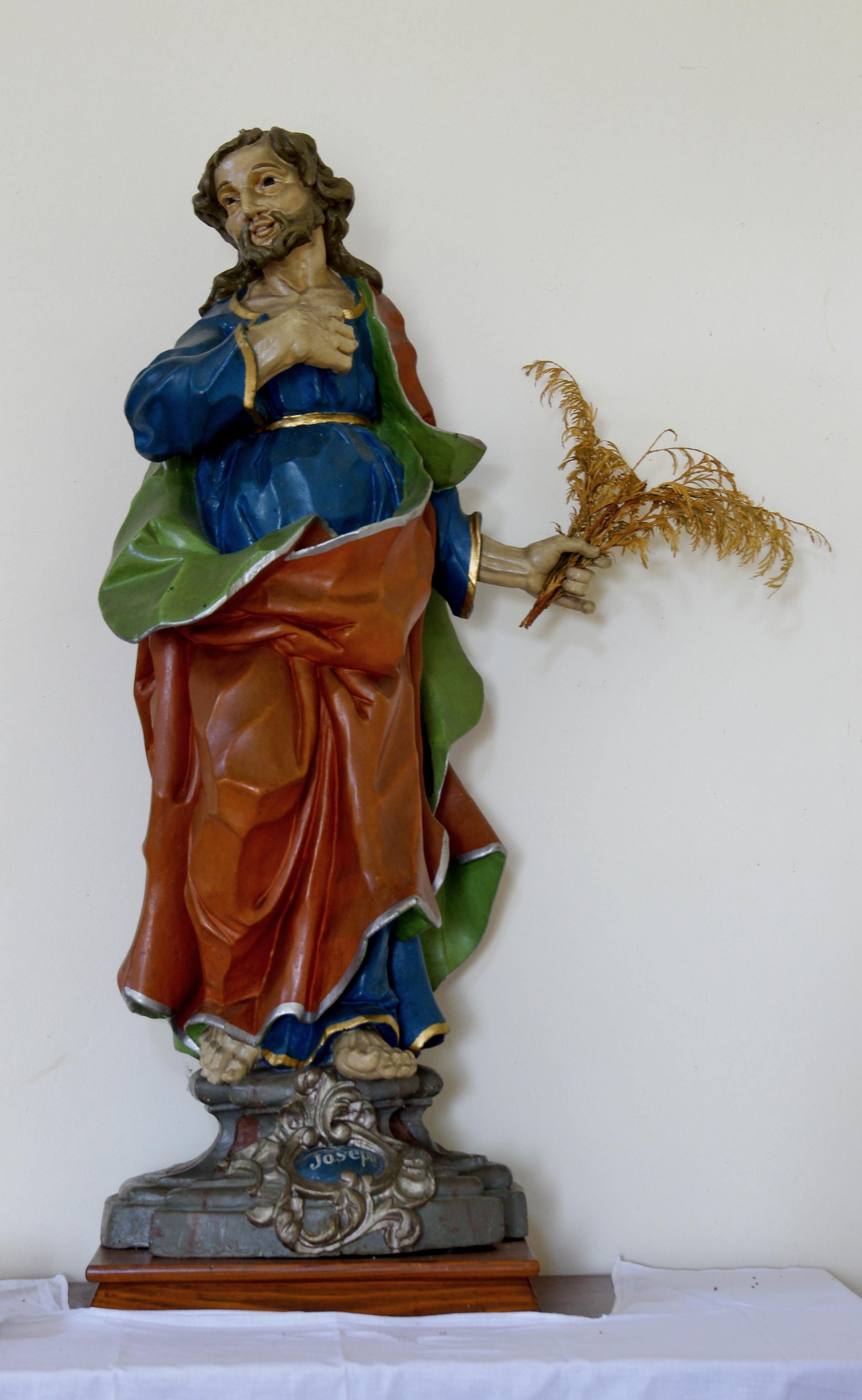 Johanneskapelle in Staufen im Breisgau